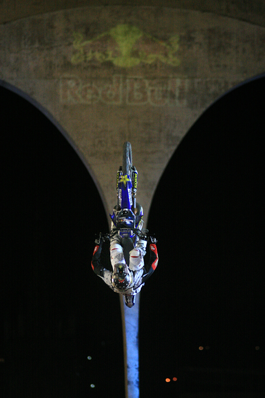 "Jeremy Stenberg" piloto Norte-americano conquistou o primeiro lugar do evento Red Bull X-Fighters etapa Rio de Janeiro